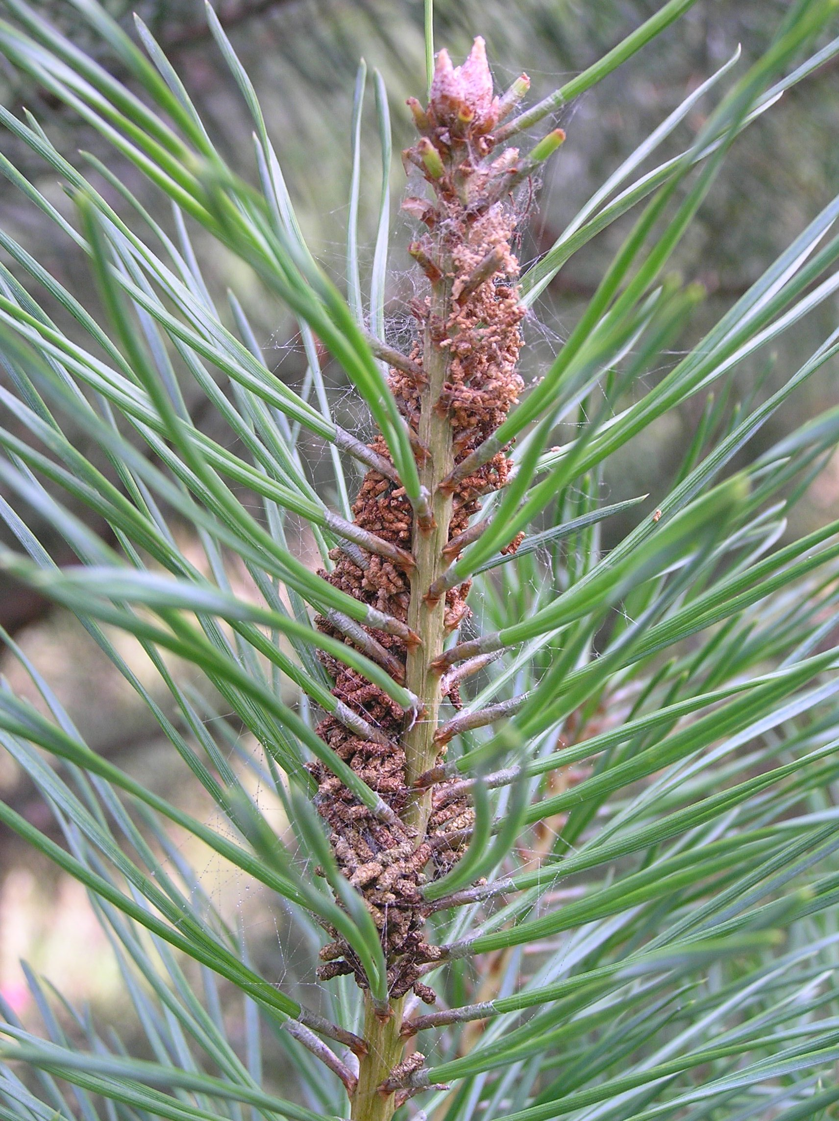 Acantholyda hieroglyphica, Osnuja sadzonkowa - larwa na młodej sośnie.